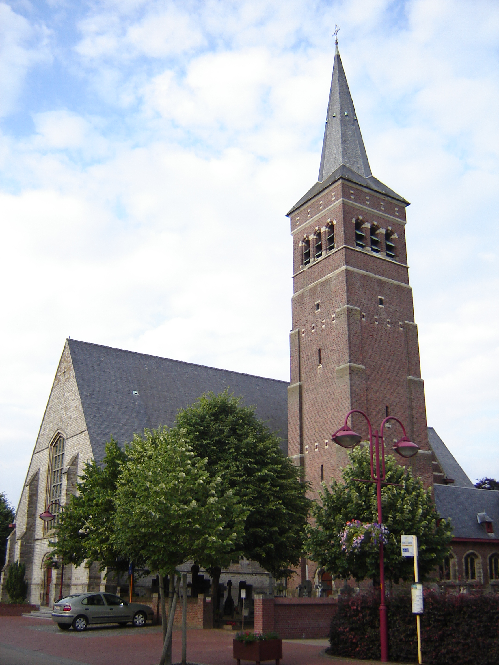 Sint-Eligiuskerk in Vosselare Church of Saint Eligius in Vosselare. Vosselare, Nevele, East Flanders, Belgium